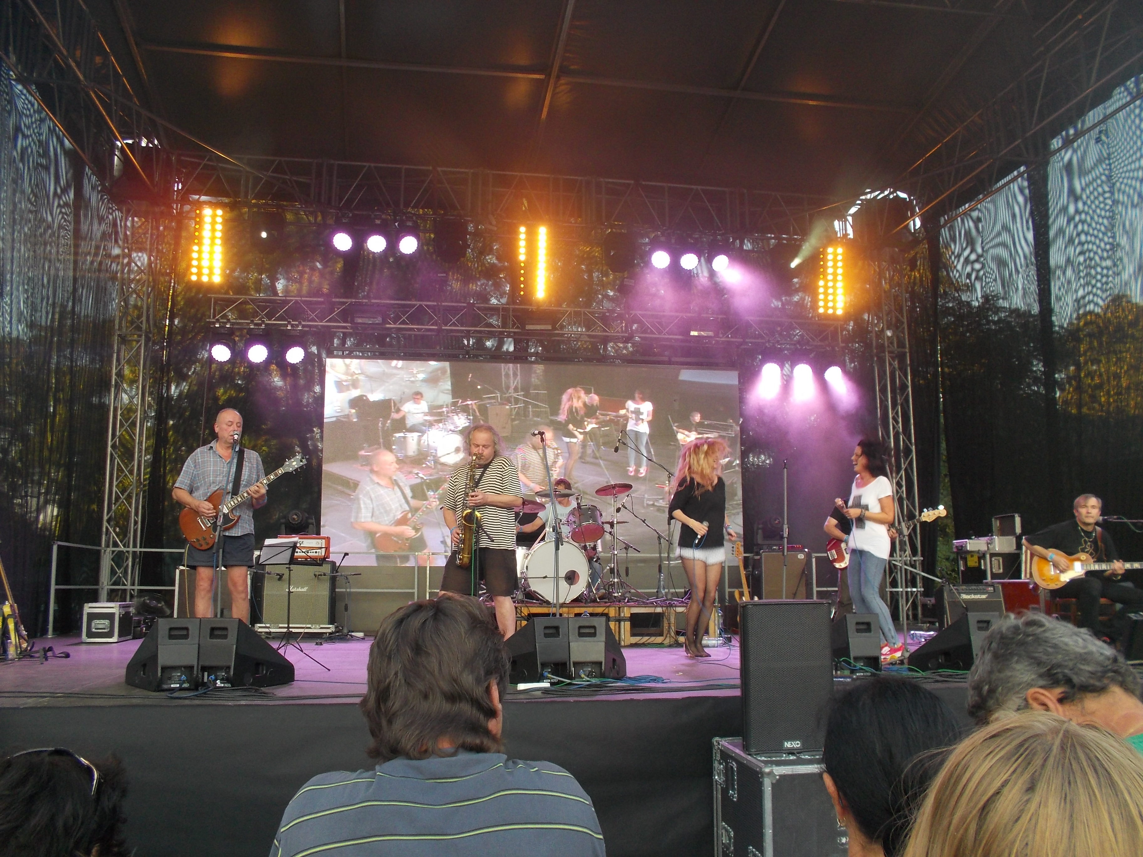 Hudba Praha na Žateckém chmelobraní 2013